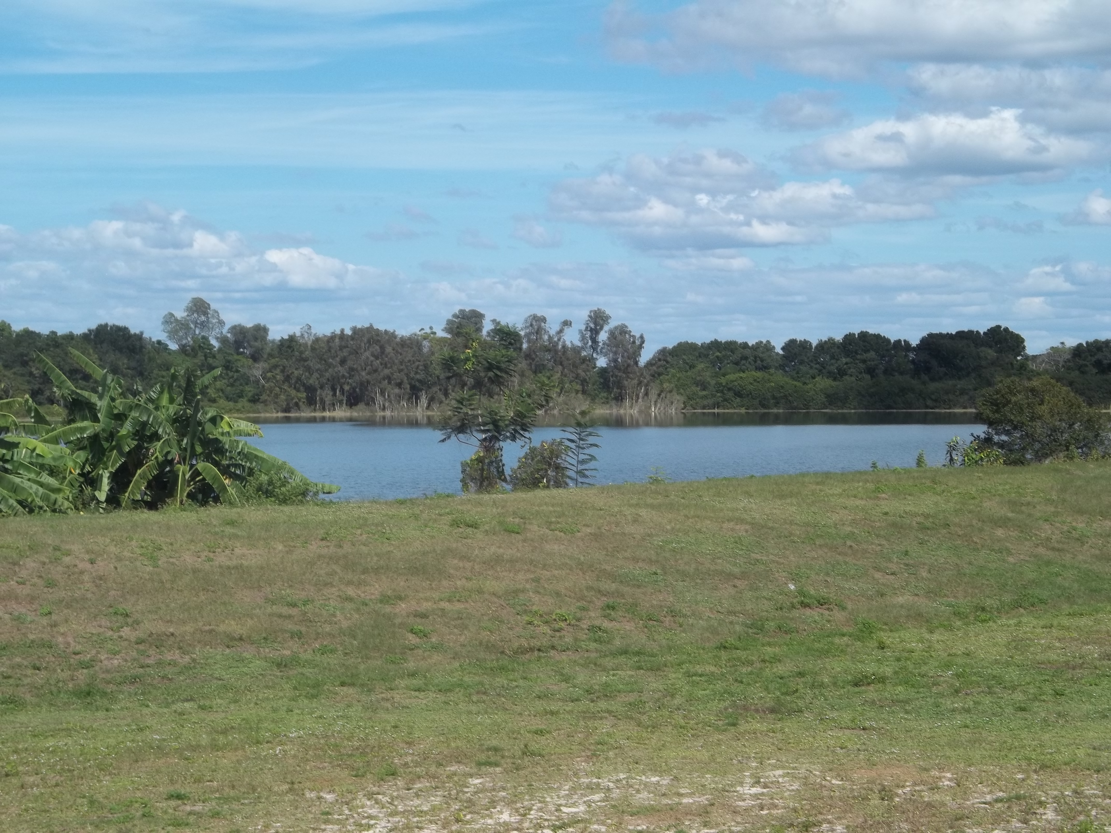 Avon Park, Florida: Lake Brentwood